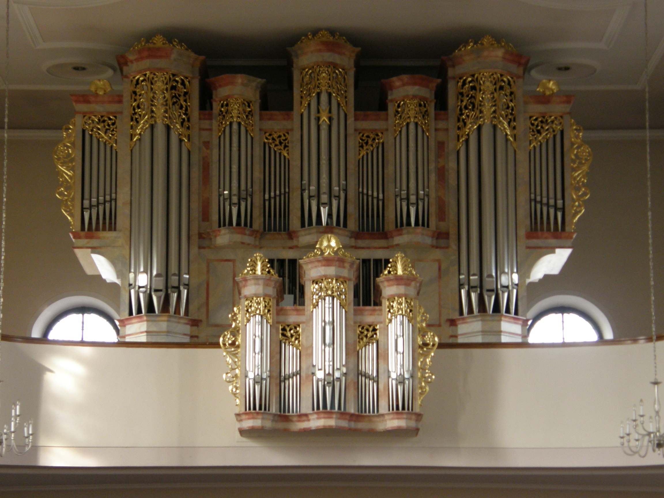 Schmid-Orgel in Mingolsheim in der St. Lambertuskirche